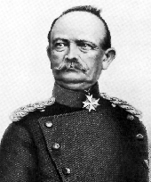 Eduard Friedrich Karl von Fransecky, (* 16. November 1807; † 21. Mai 1890)